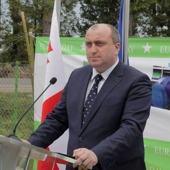 არჩილ ხაბაძე